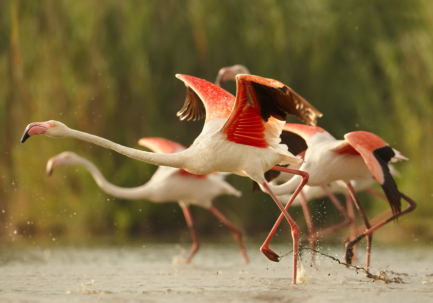 Phoenicopterus roseus, Camargue, France